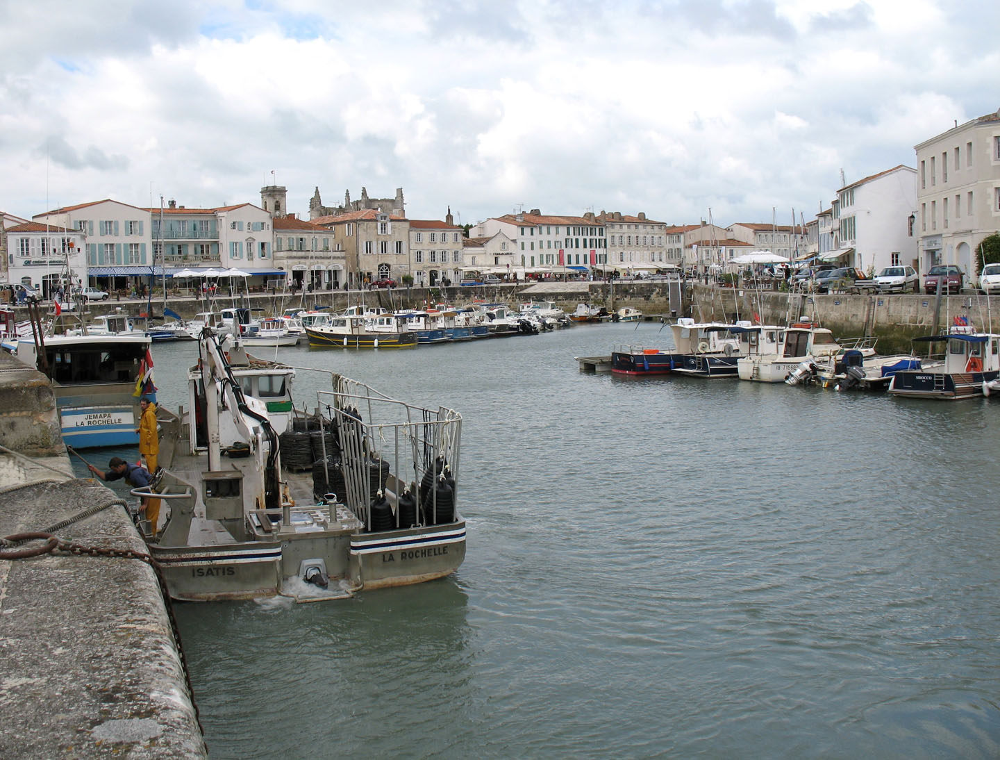 Saint-Martin-de-Ré, île de Ré, France